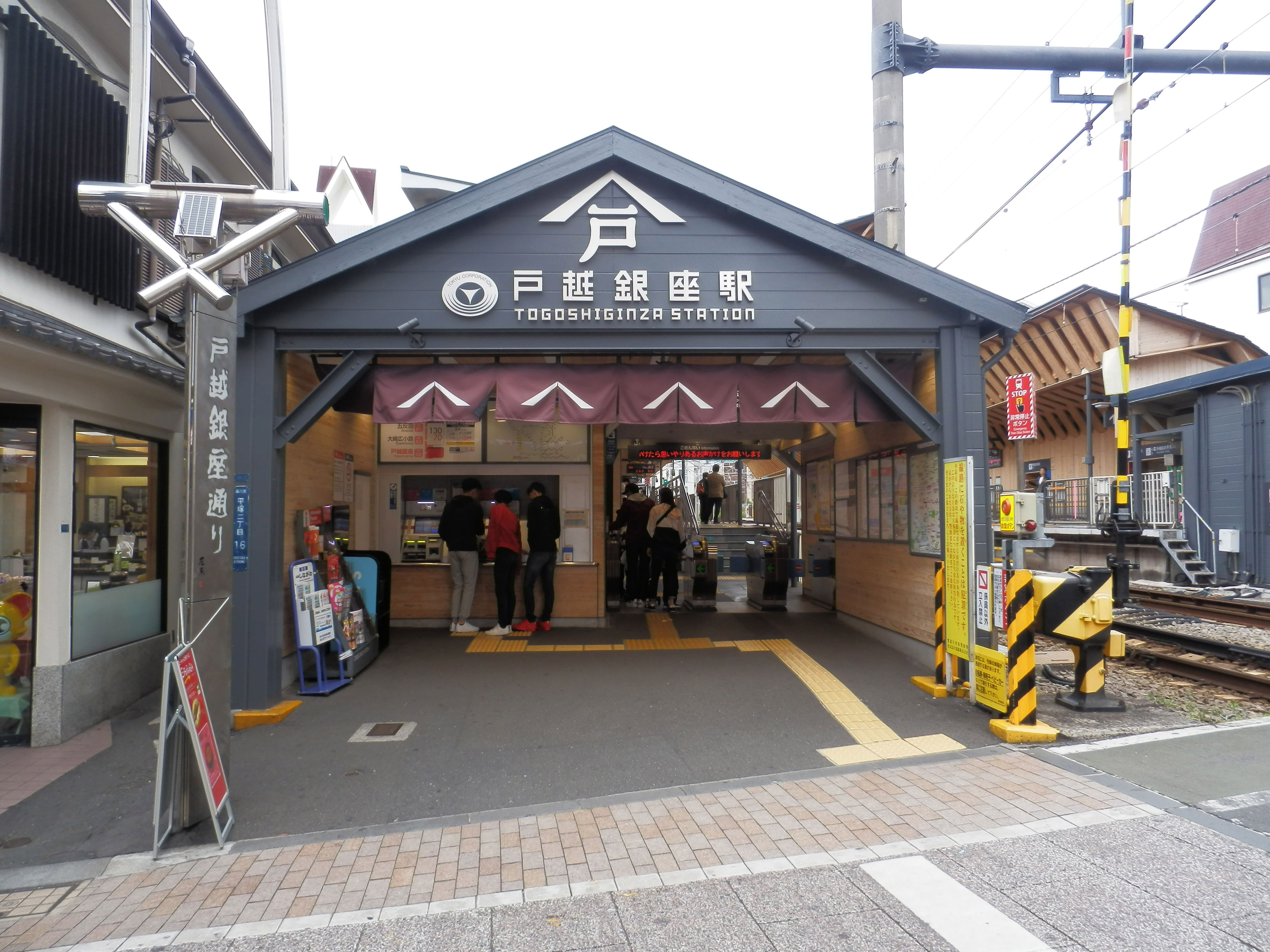 戸越銀座駅五反田方面入口